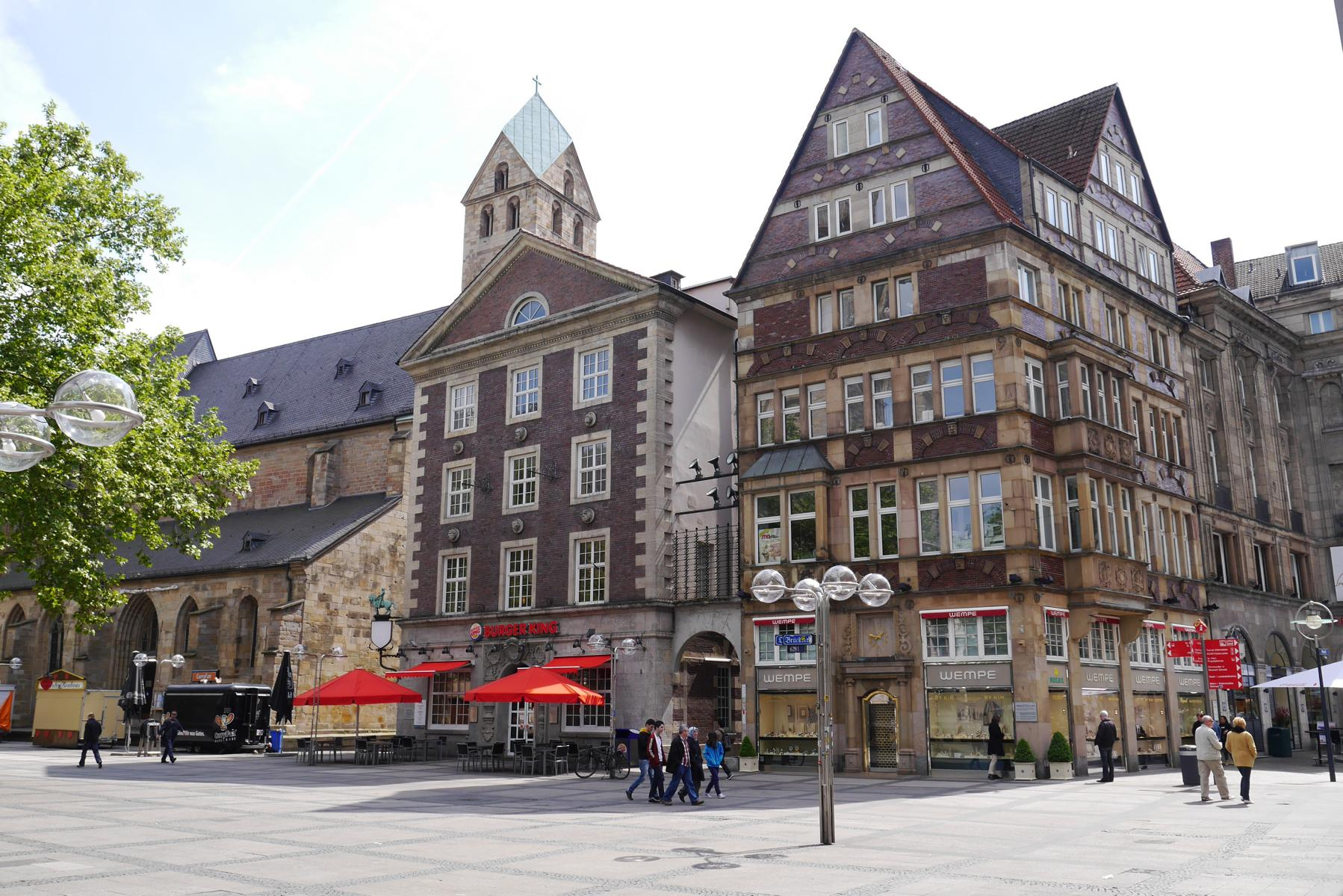 Häuserzeile am Ostenhellweg (Dortmund) mit Herbrechtschem Haus und Marienkirche